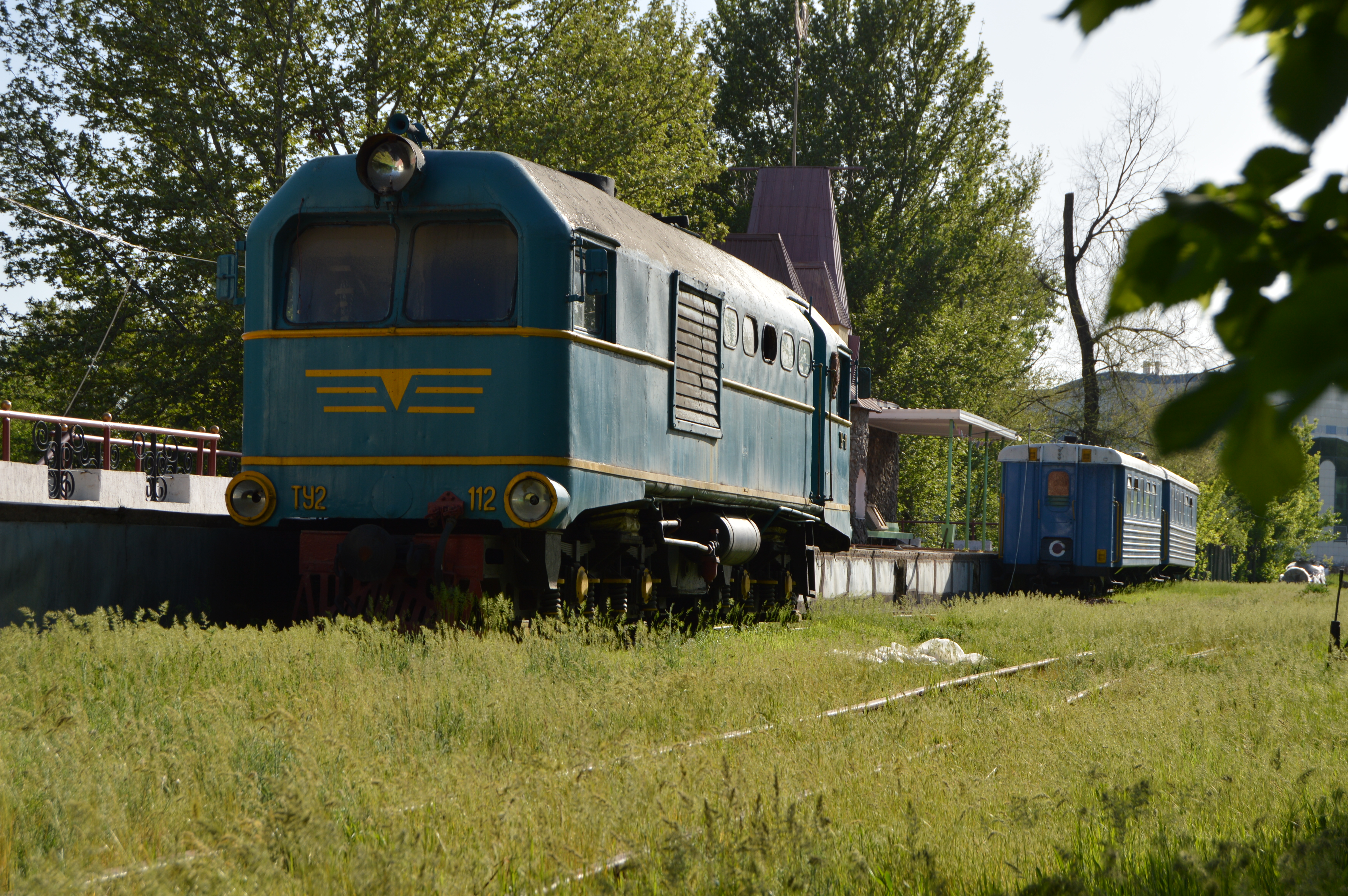 Станция Спортивная на ДЖД в Шымкенте,Казахстан